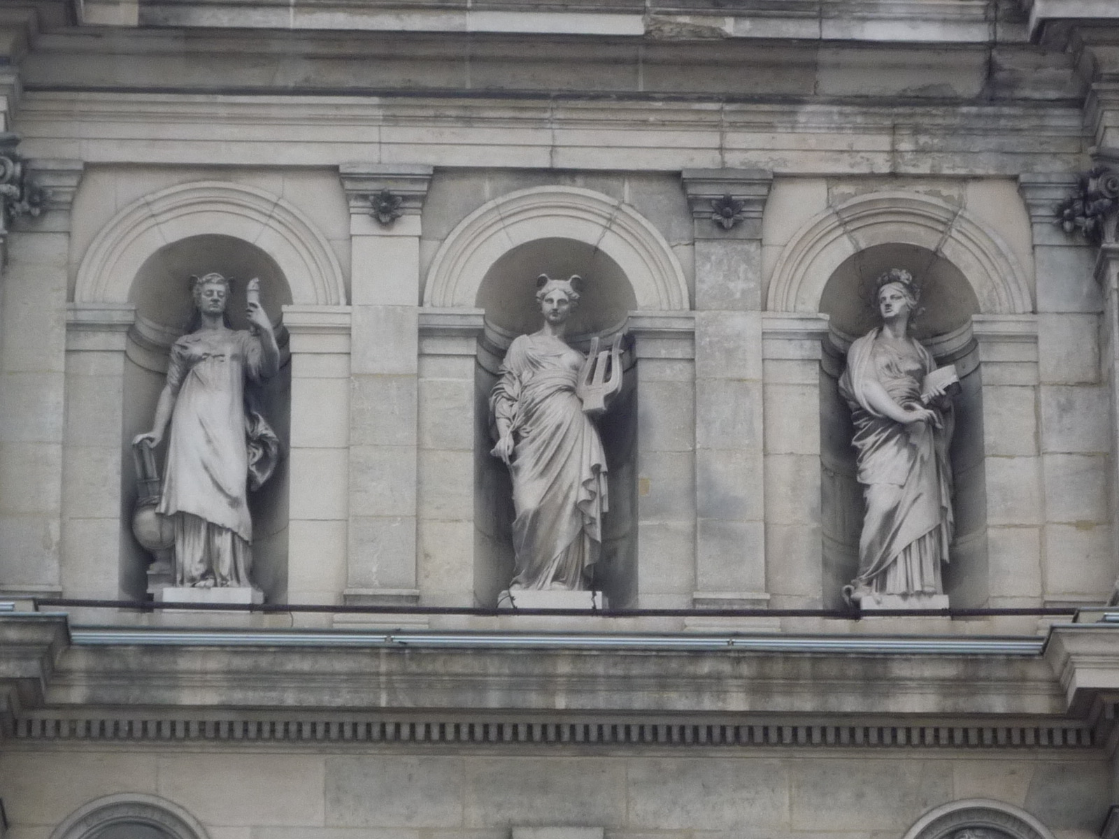 Statues des muses de la poésie, de la science, de l'histoire sur le côté droit de la façade de l'ancien musée-bibliothèque (1872) de Grenoble.